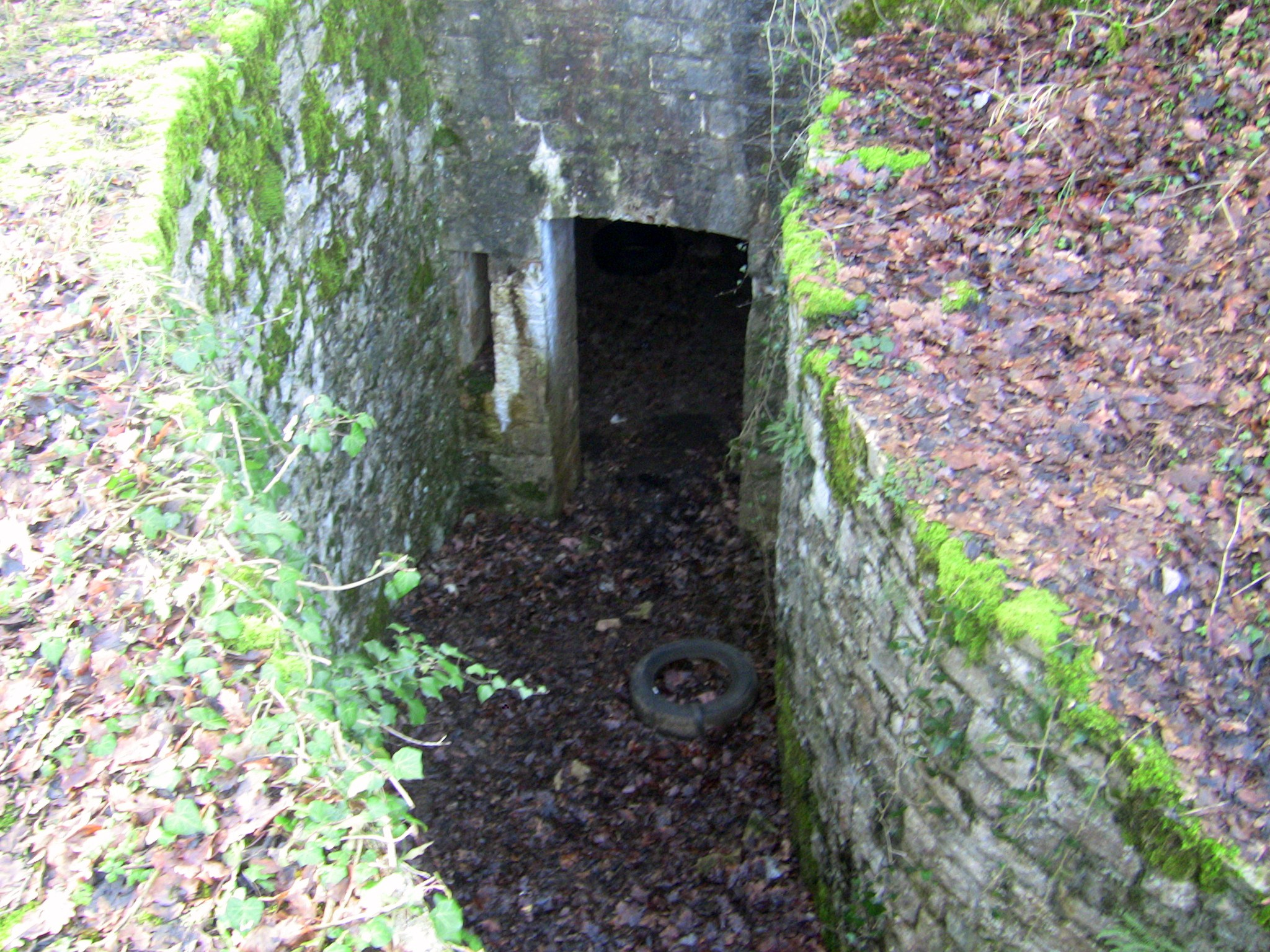 Entrée 2 une du front de batterie nord du fort de Planoise, à Besançon (Doubs, France).